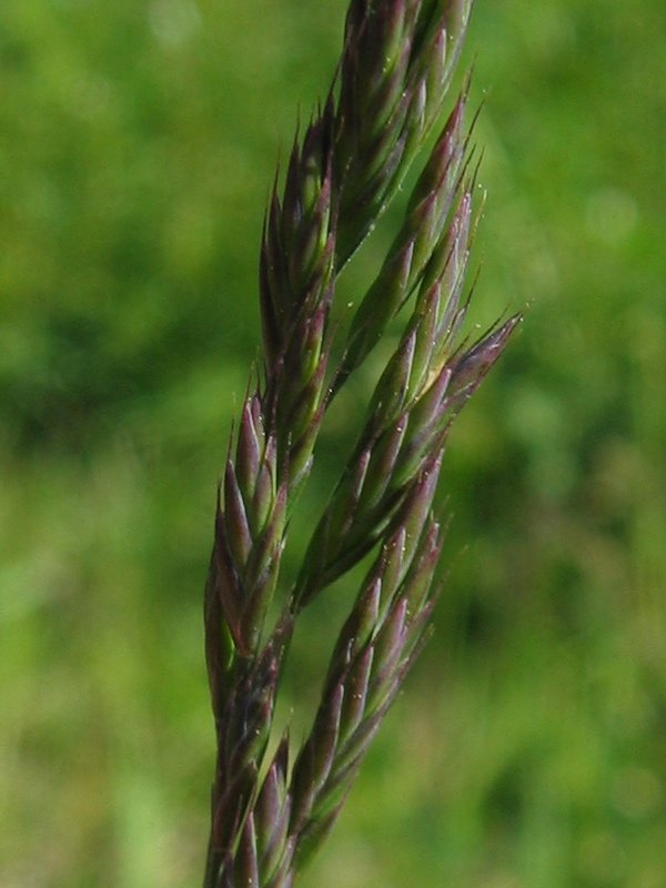 Rot-Schwingel Festuca rubra agg., Stoltera Nähe Rostock